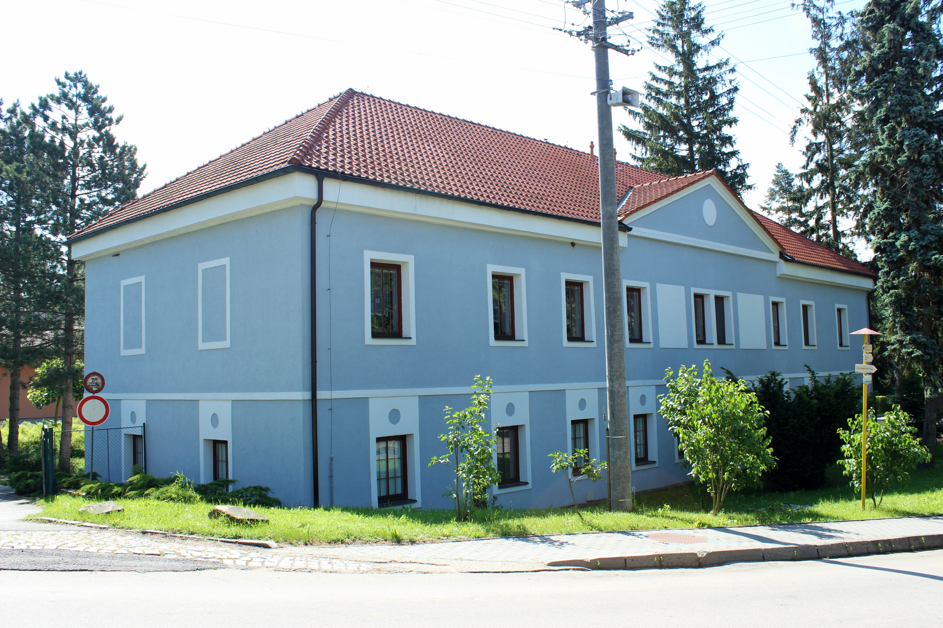 Nezdenice, zrekonstruovaná budova empírového zámku.